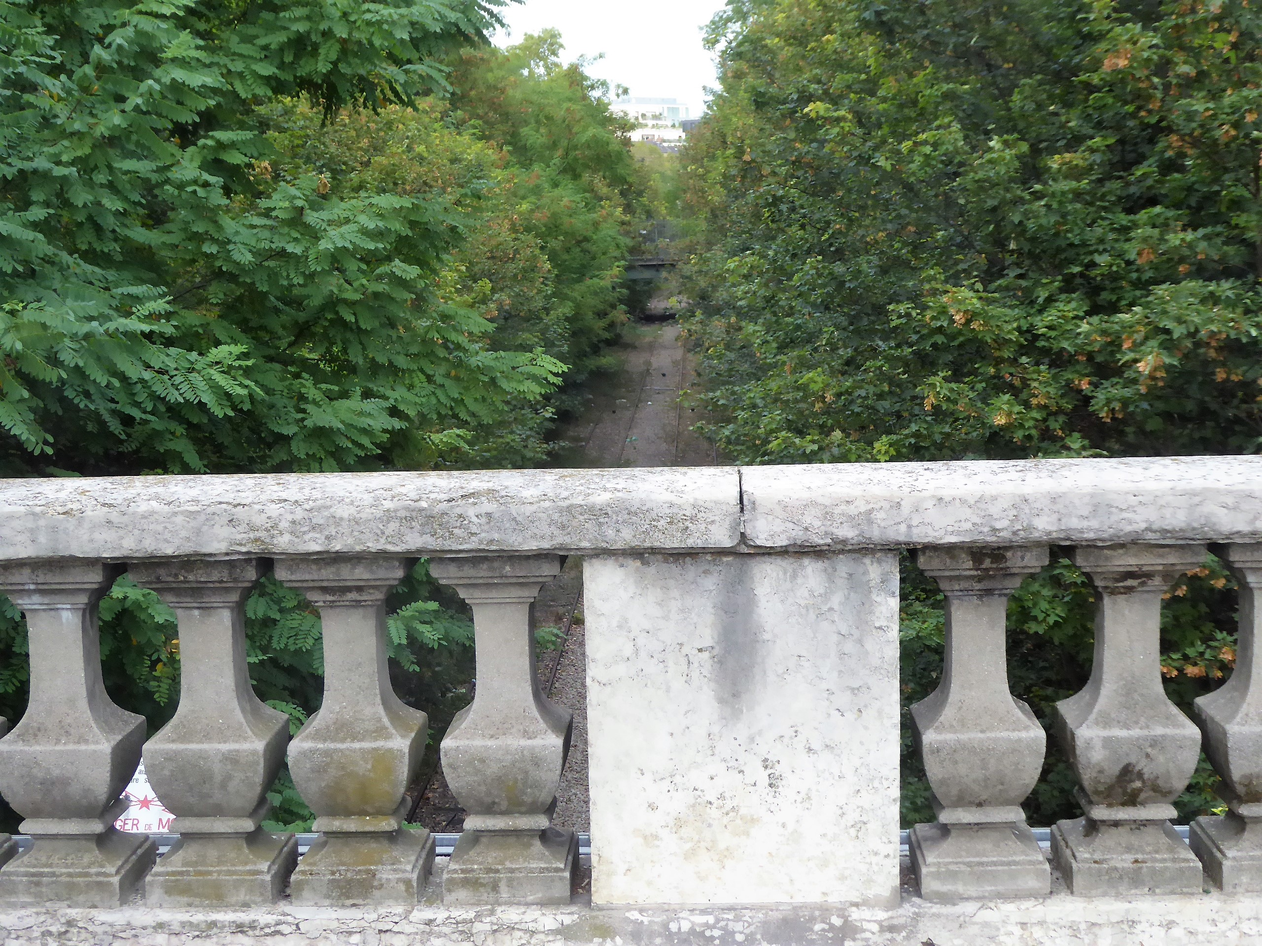 Ligne d'Auteuil place de Wagram vers le nord